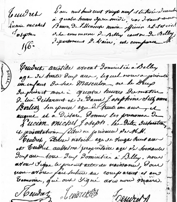 acte de naissance montrant bien qu'il est faux de dire que L Tendret est né en 1825. Cet acte montre que sa mère n'est pas une Brillat